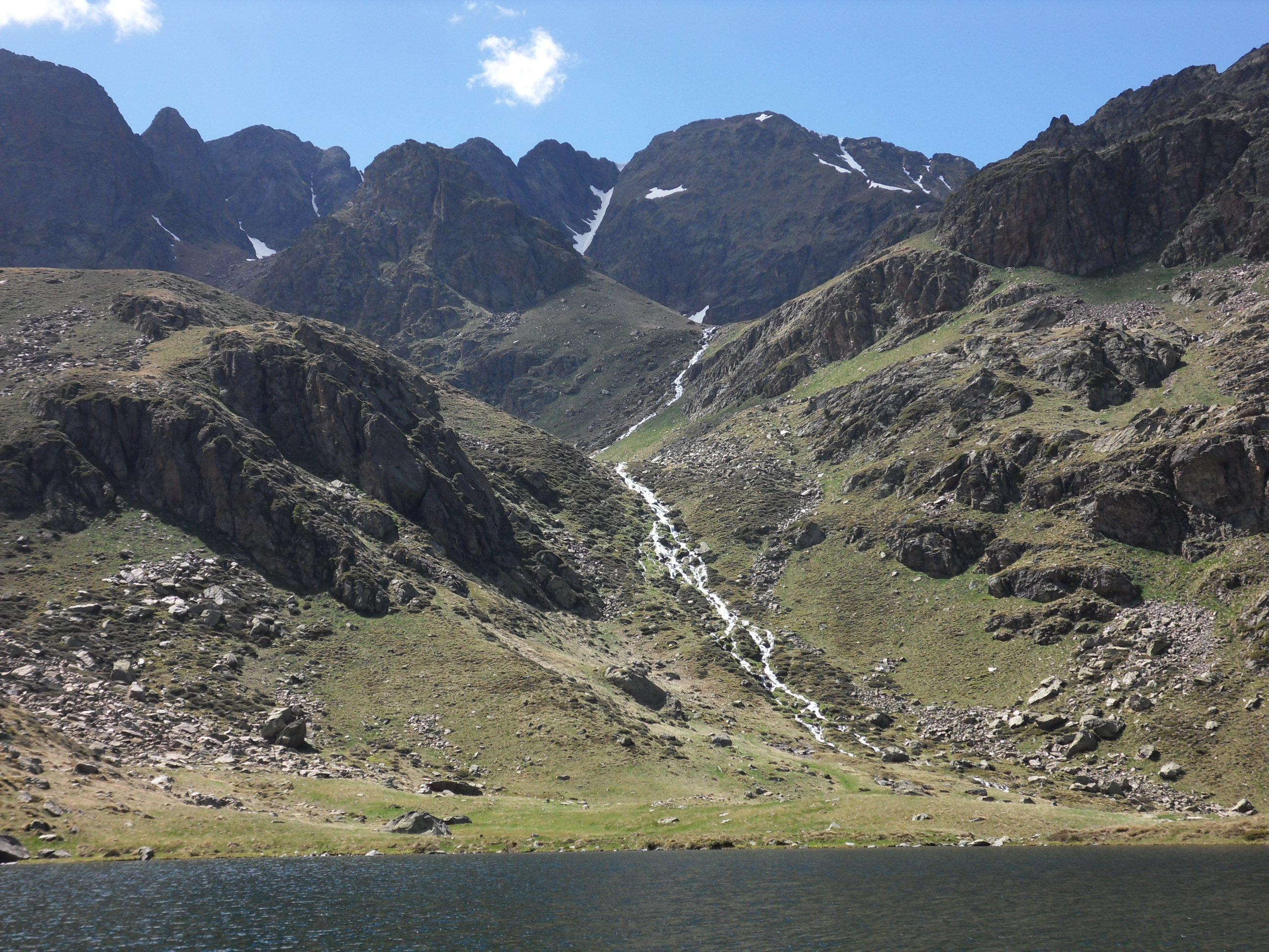 Etang et Pointe de Roumazet,vallée de Vicdessos, Ariège, région Midi-Pyrénées, France (mai 2011)